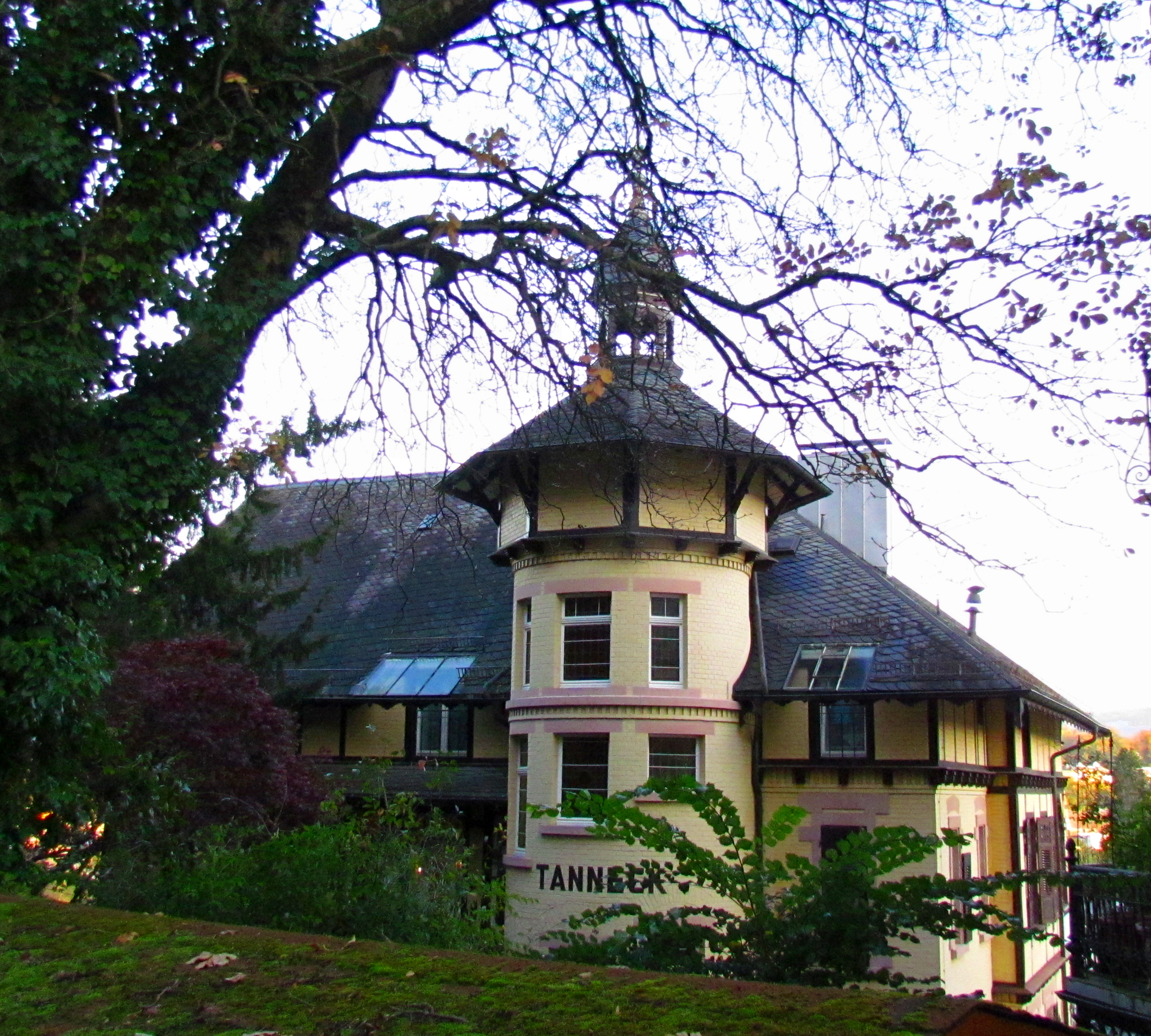 Bildinhalt: Das Hotel Tanneck, Werderstraße 14, von Nord-Westen aus gesehen. Aufnahmeort: Baden-Baden, Deutschland